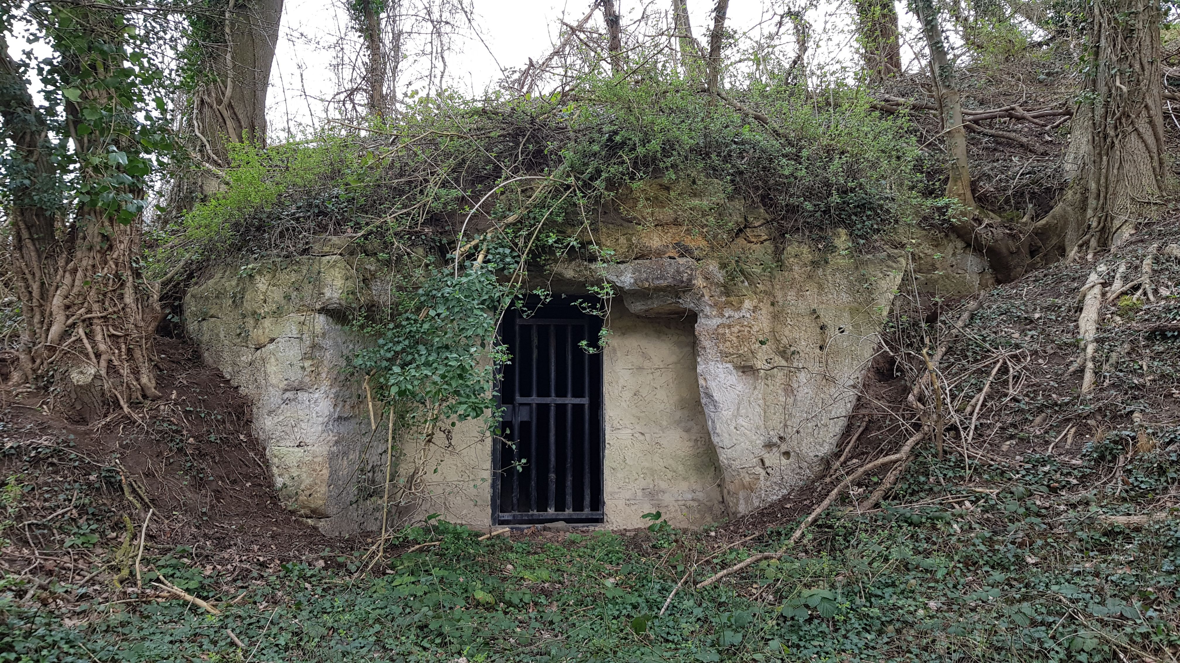 Hotsboomgroeve, Cadier en Keer, Nederland